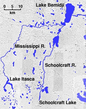 Carte de la Schoolcraft River et du Mississippi